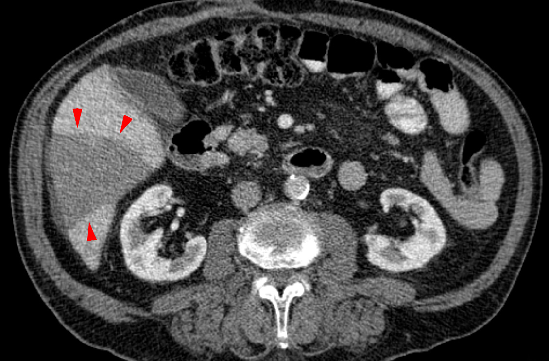 Teilinfarkt der Leber durch Verschluss eines Pfortaderastes in der axialen Computertomographie.